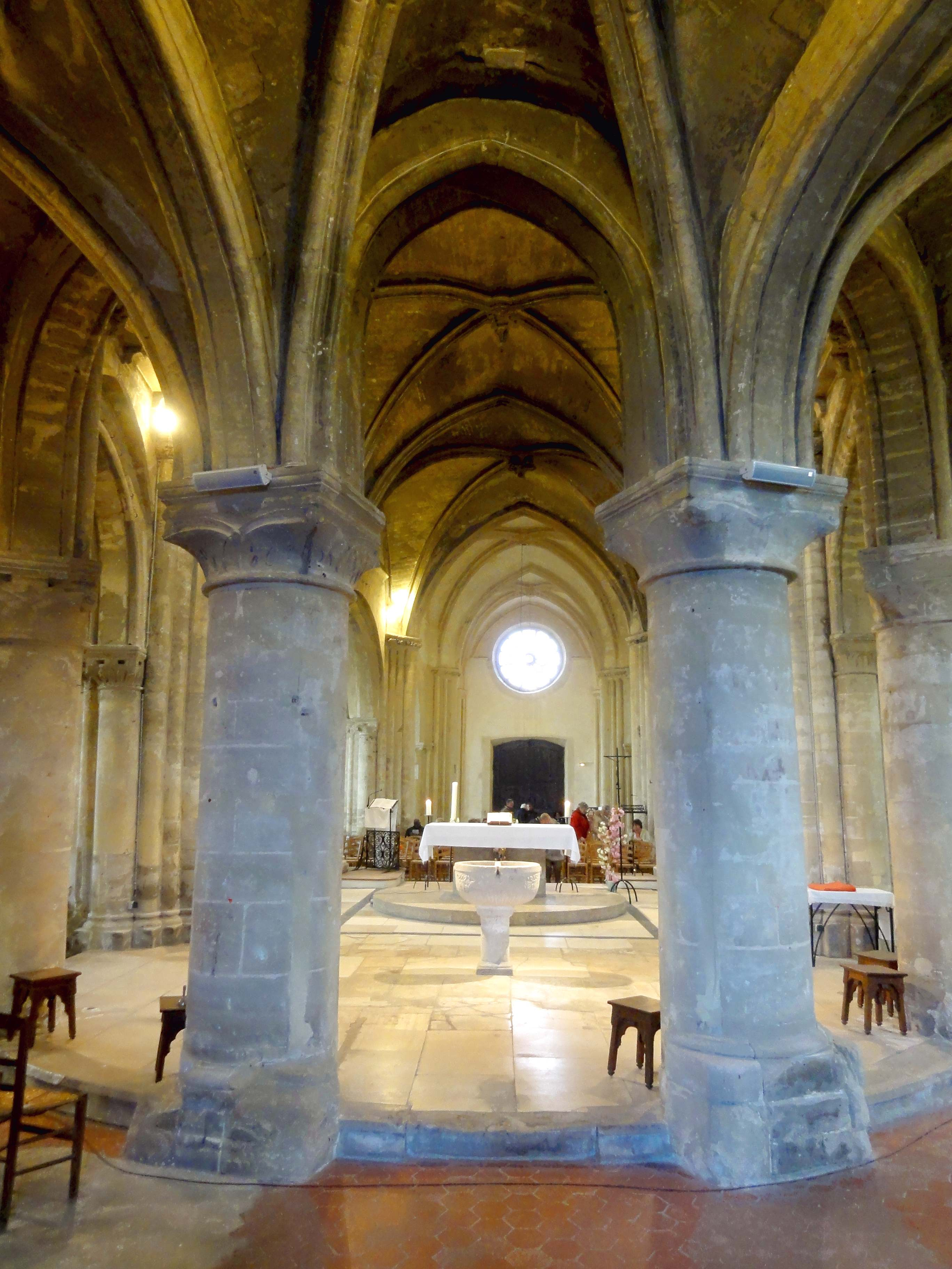 Intérieur de l'église - voir titre.